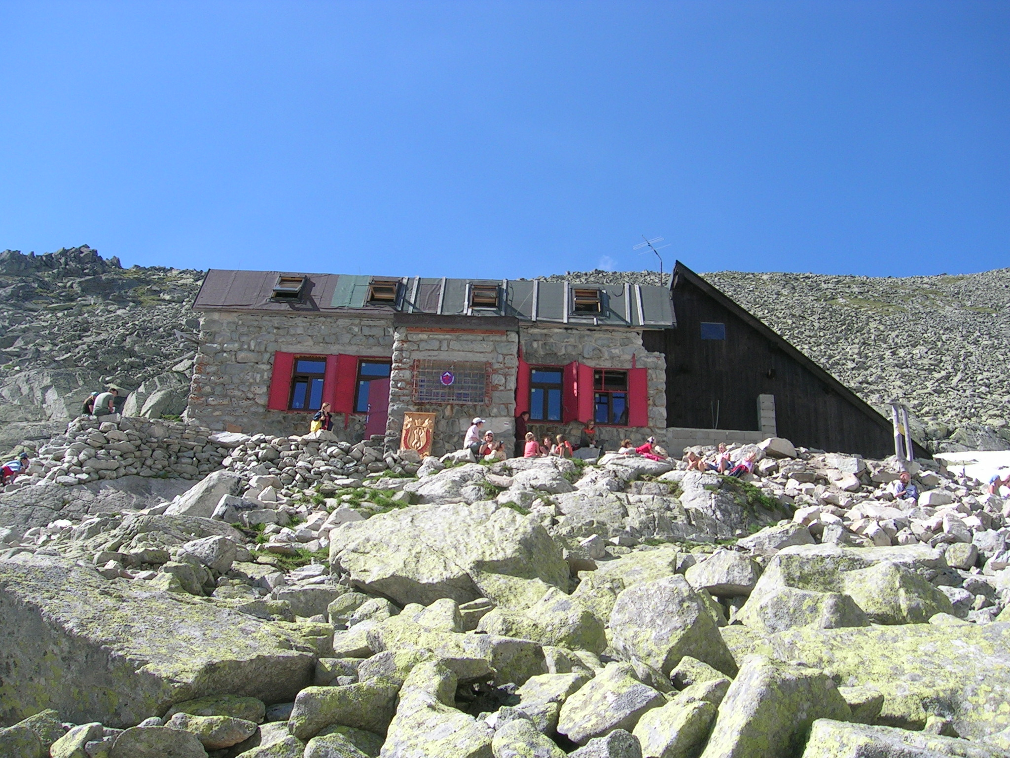 Chata Pod Rysami